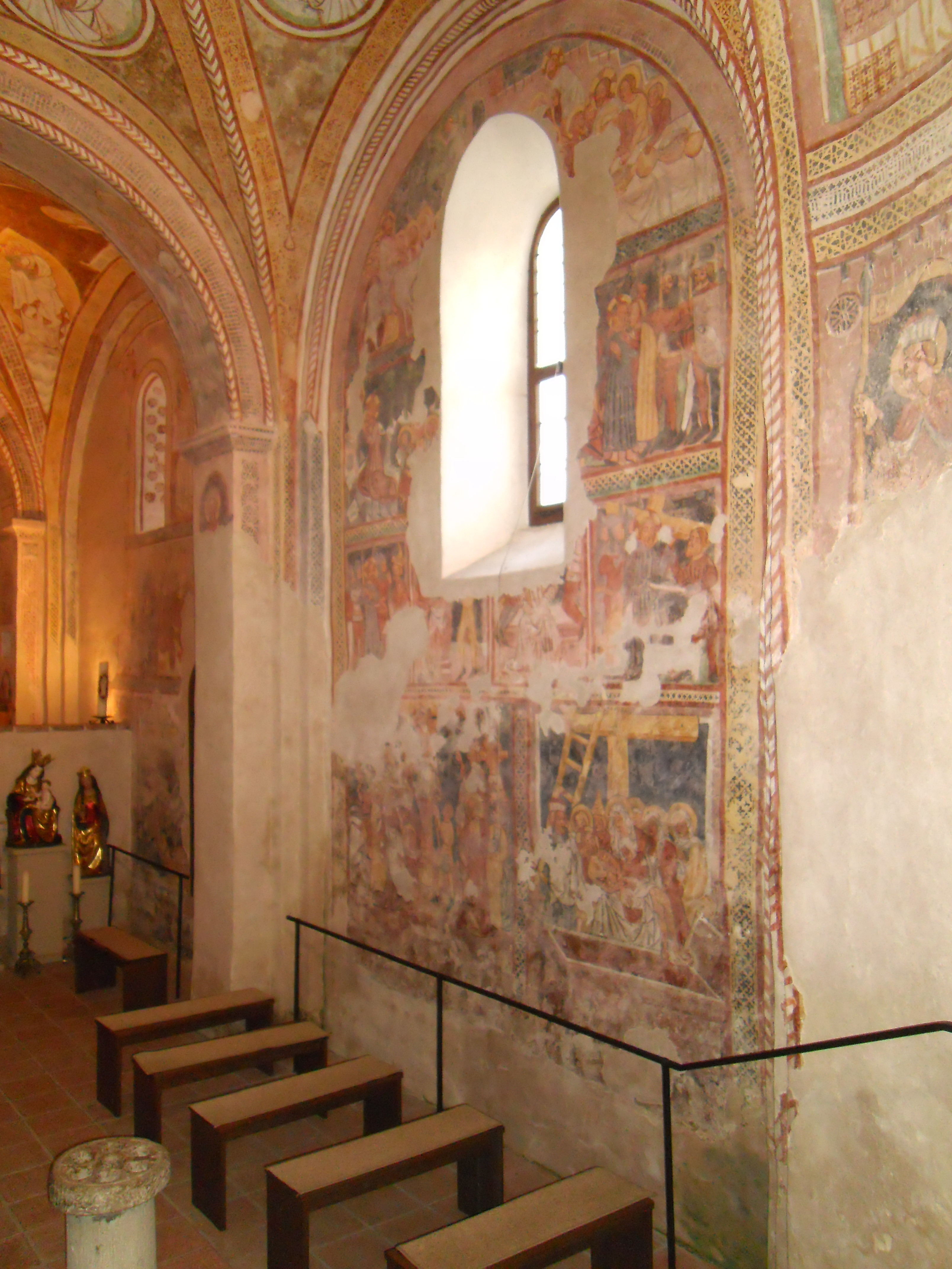 Kirche St. Jakobus in Urschalling, Gemeinde Prien am Chiemsee; Fragmente von Fresken an der rechten Innenwand des Kirchenschiffs.